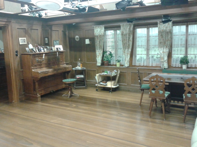 Drehstudio für Innenaufnahmen der TV-Serie Die Fallers – Eine Schwarzwaldfamilie.